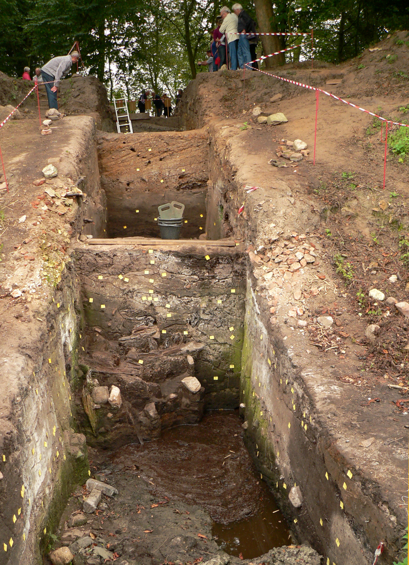 Ausgrabung Burg Wölpe 2013. Der Grabungsschnitt geht in die Tiefe mit der Absicht, auf den gewachsenen Boden unter dem Hügel zu stoßen.